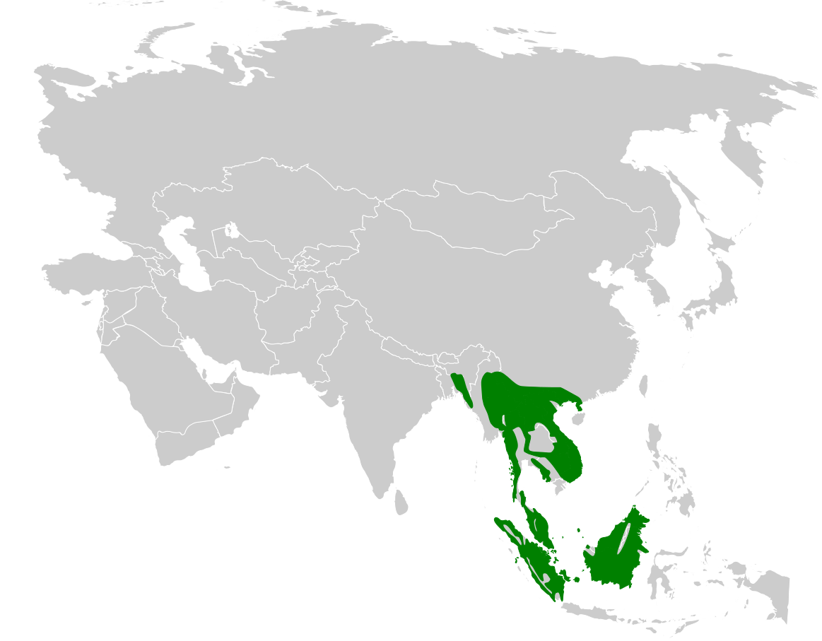 Iole distribution map